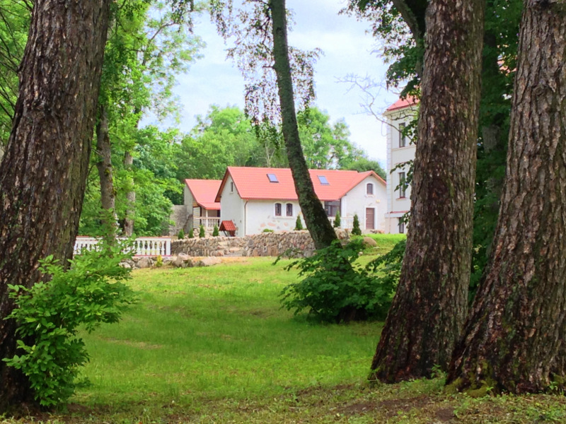 June 2013. Beautiful Latvia